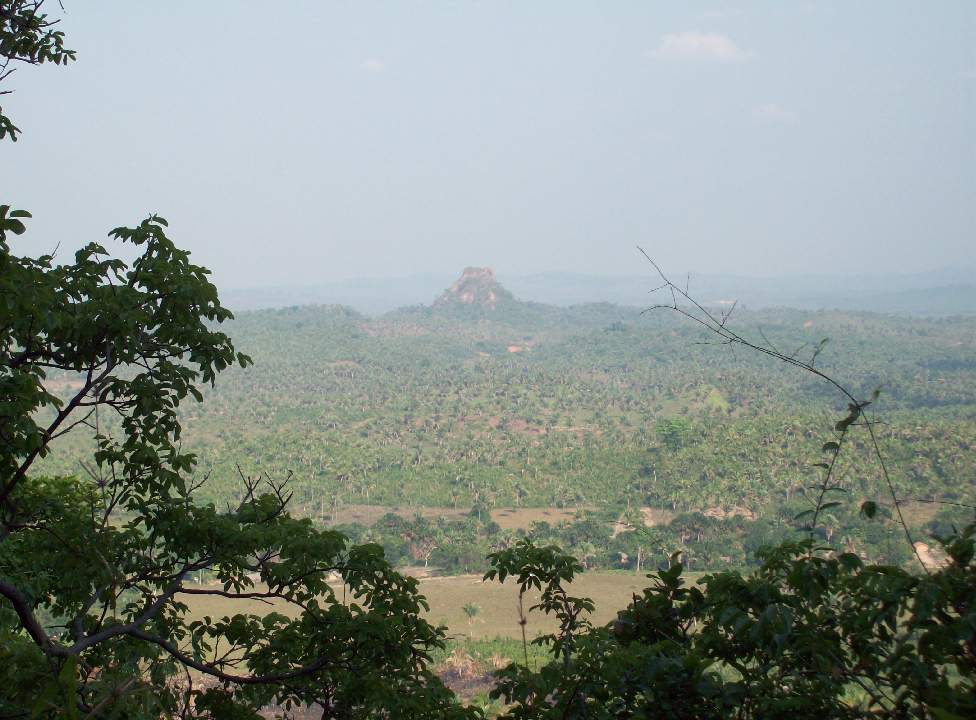 Axixá do Tocantins, Tocantins Brasil.